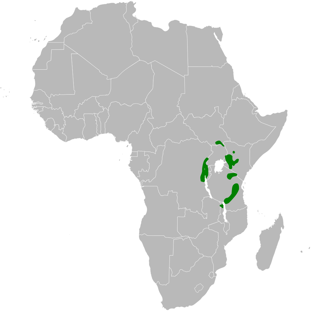 Iduna similis distribution map, based on